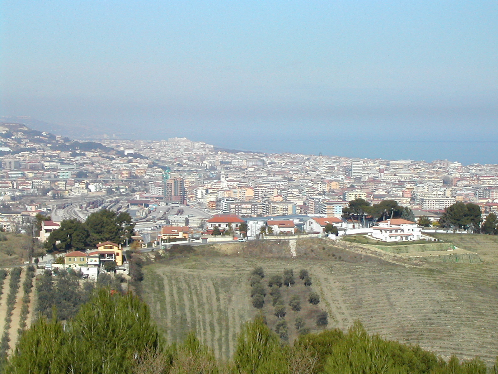 Panorama di Pescara dai colli del sud